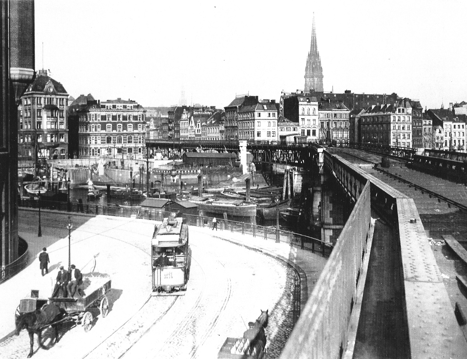 Hamburg - Baumwall 1912